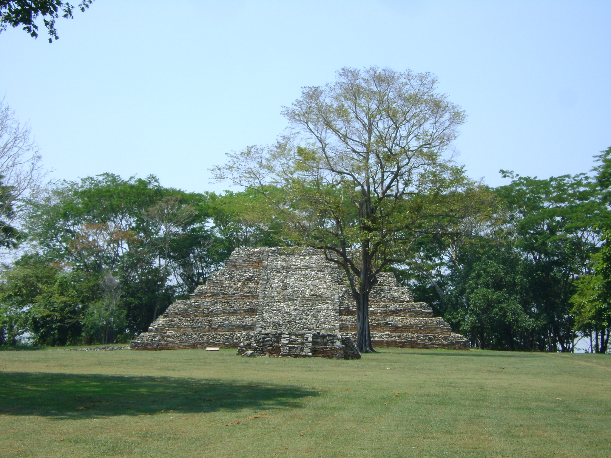 Acompañamiento forestal en la ZA Pomoná.